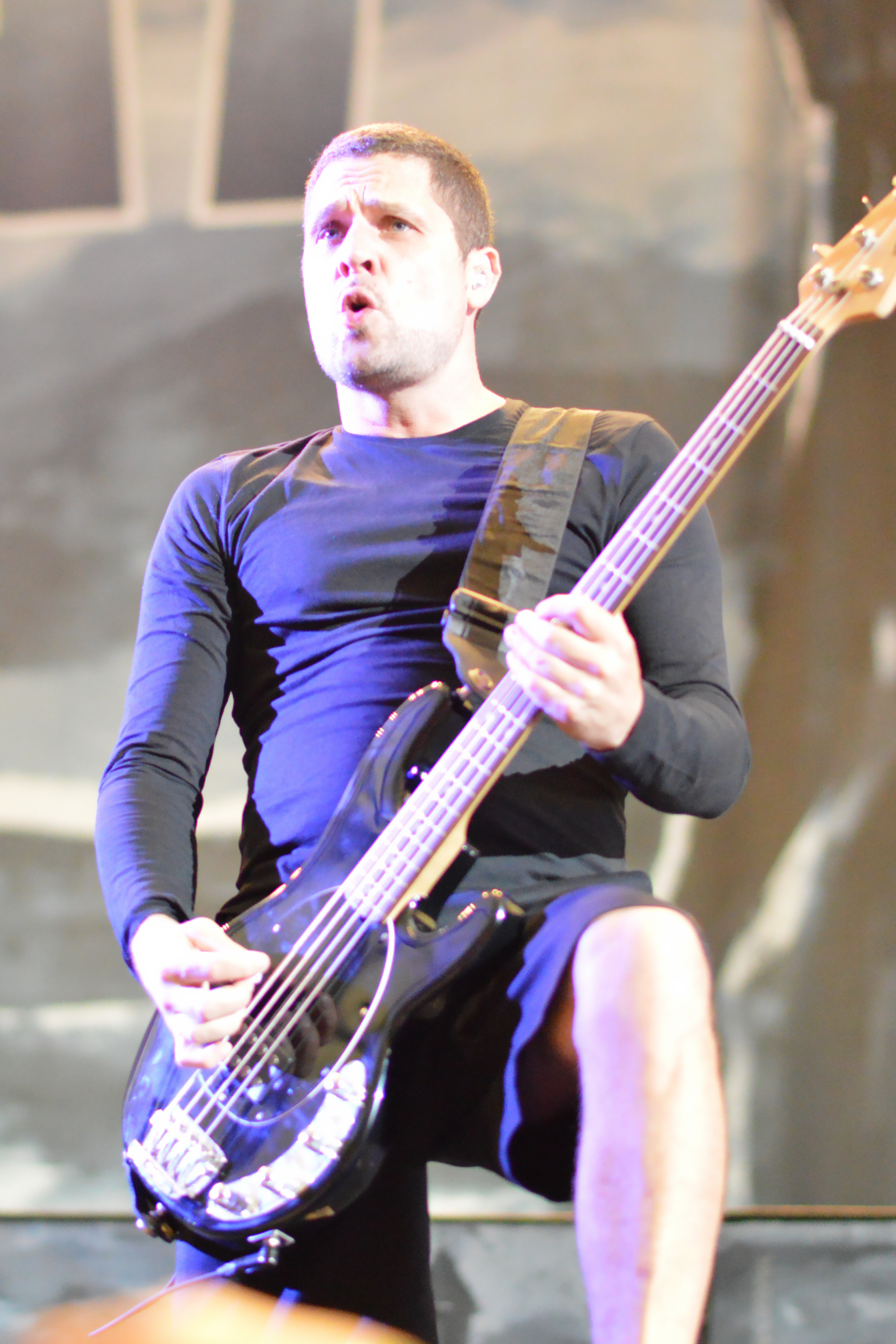 Volbeat bei Rock im Pott 2013